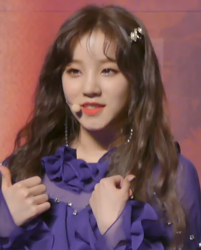 0226 (여자)아이들 우기 포커스&세로캠, 2nd 미니앨범 'I made' 쇼케이스 포토타임.